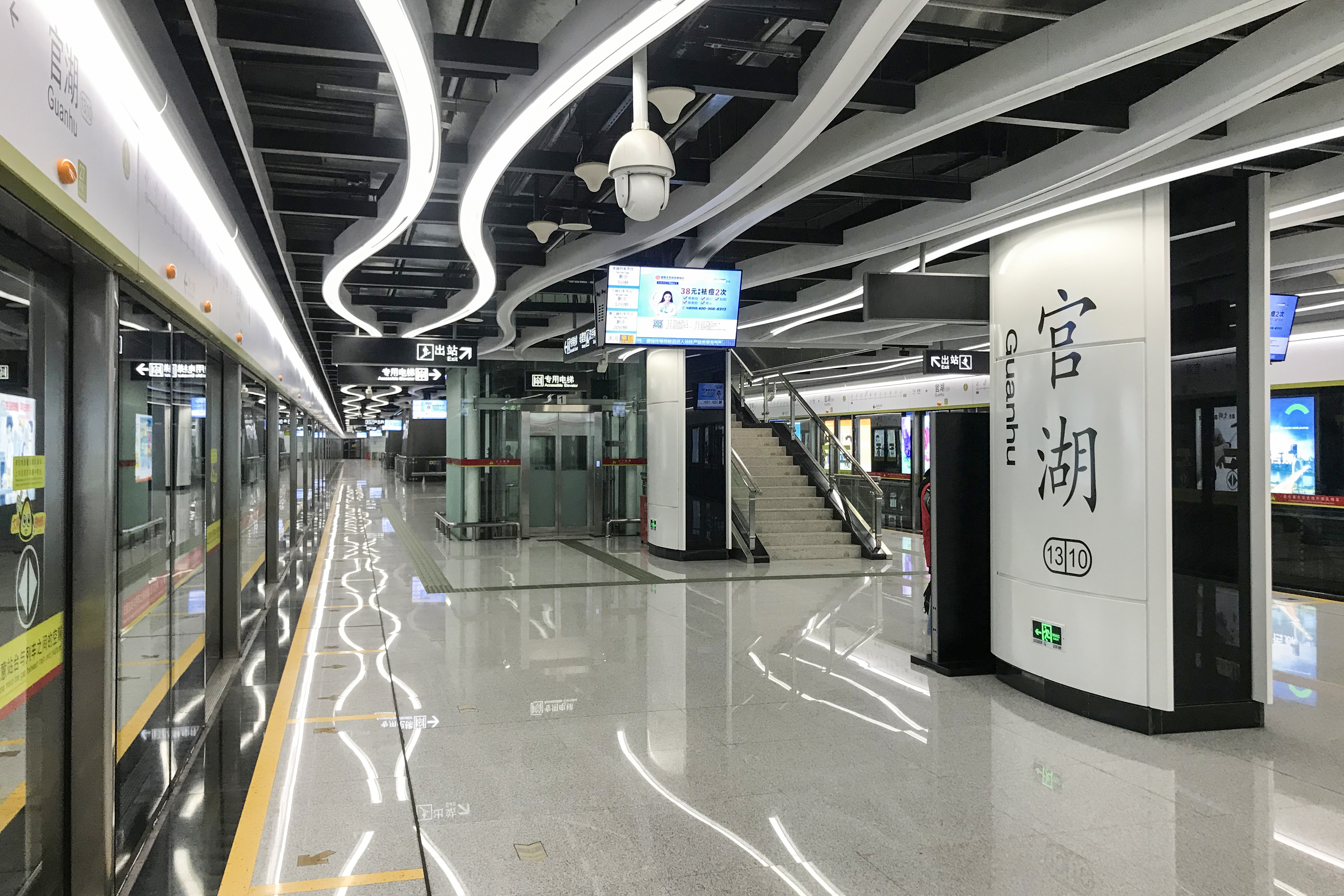 广州地铁官湖站